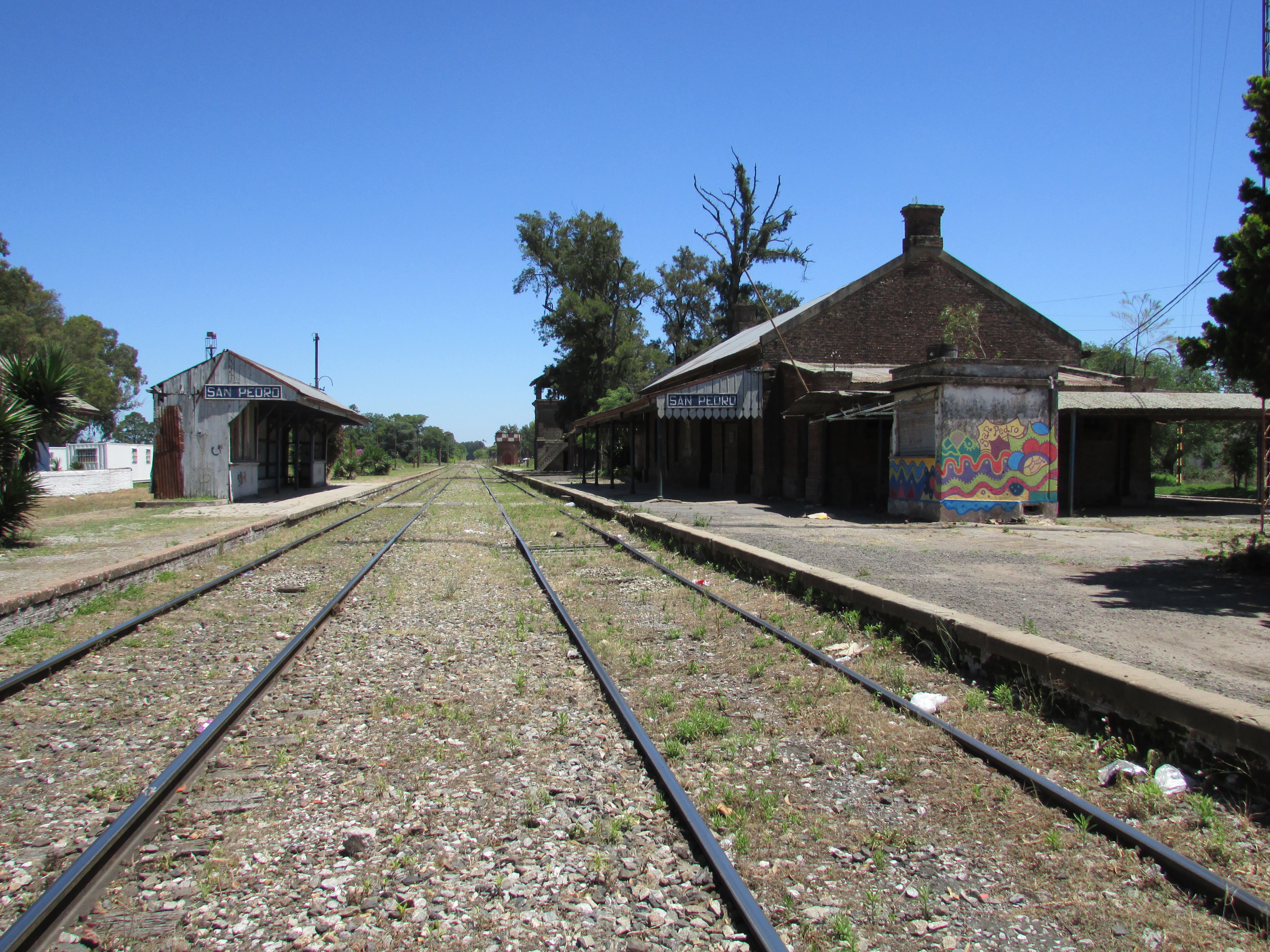 Vías principales del Ferrocarril General Bartolomé Mitre en la estación San Pedro, provincia de Buenos Aires, Argentina.